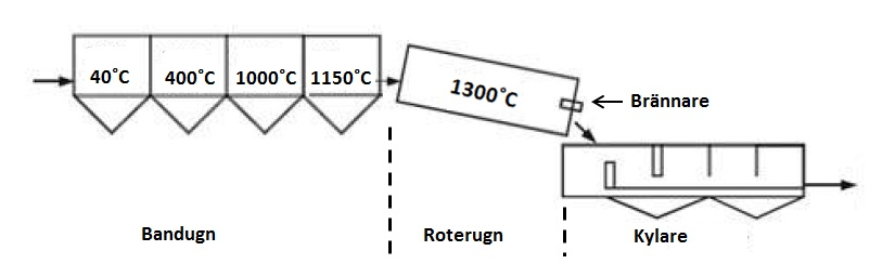 Grate-kiln flöde